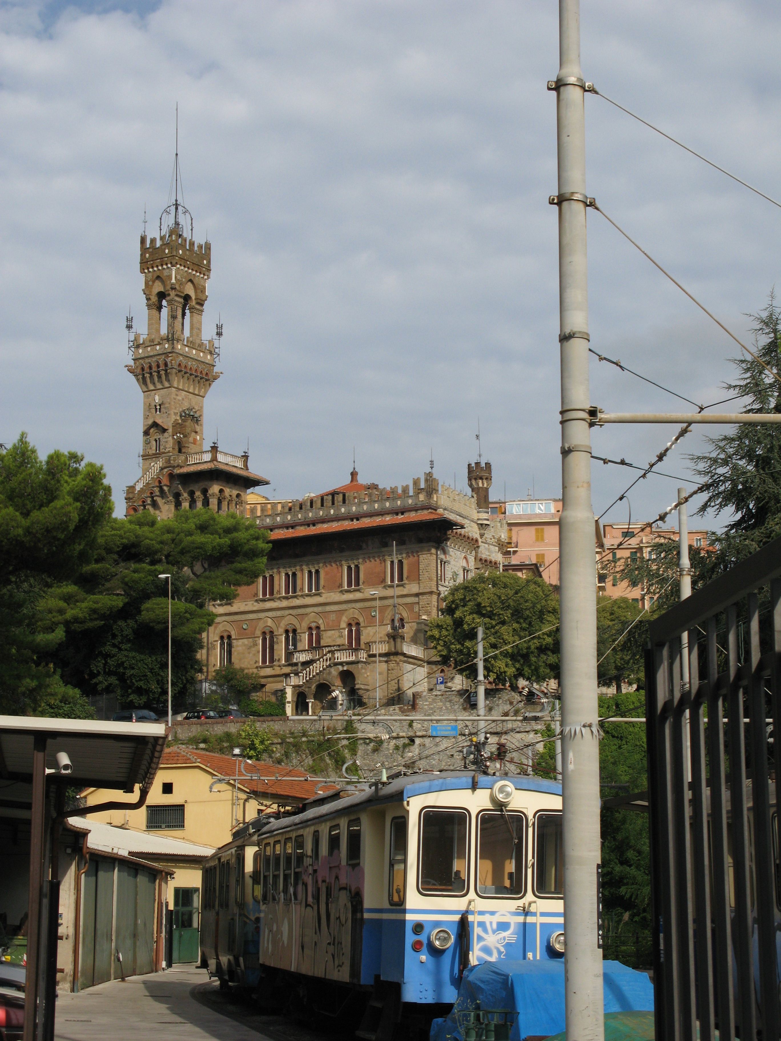 Ferrovia Genova-Casella, treno in sosta alla stazione di Genova Piazza Manin; sullo sfondo: Castello Mackenzie.